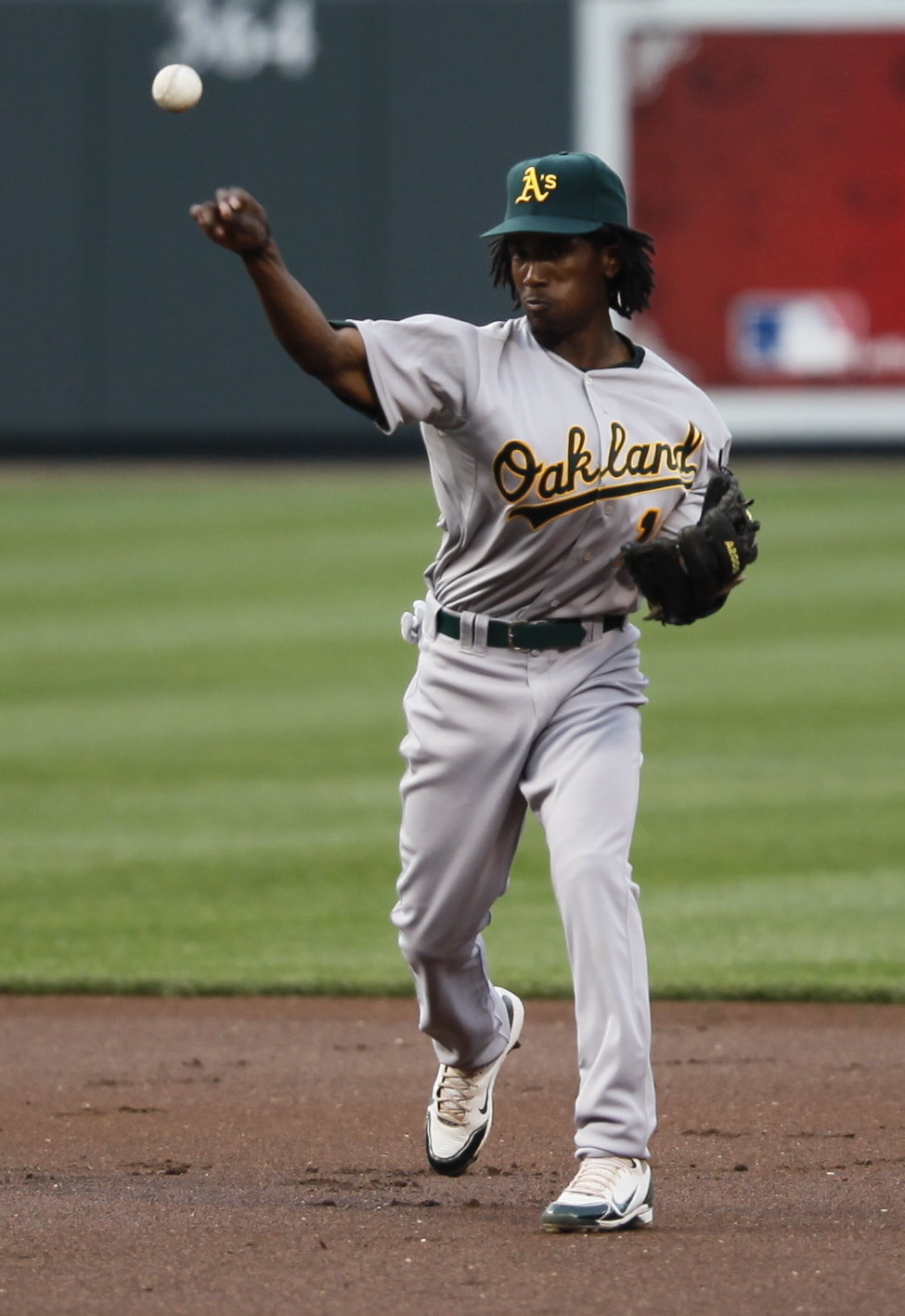 Jemile Weeks